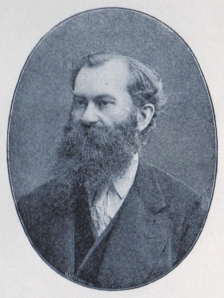 Porträtfotografie von Dr. phil. Adolf Zehlicke (1834-1904)